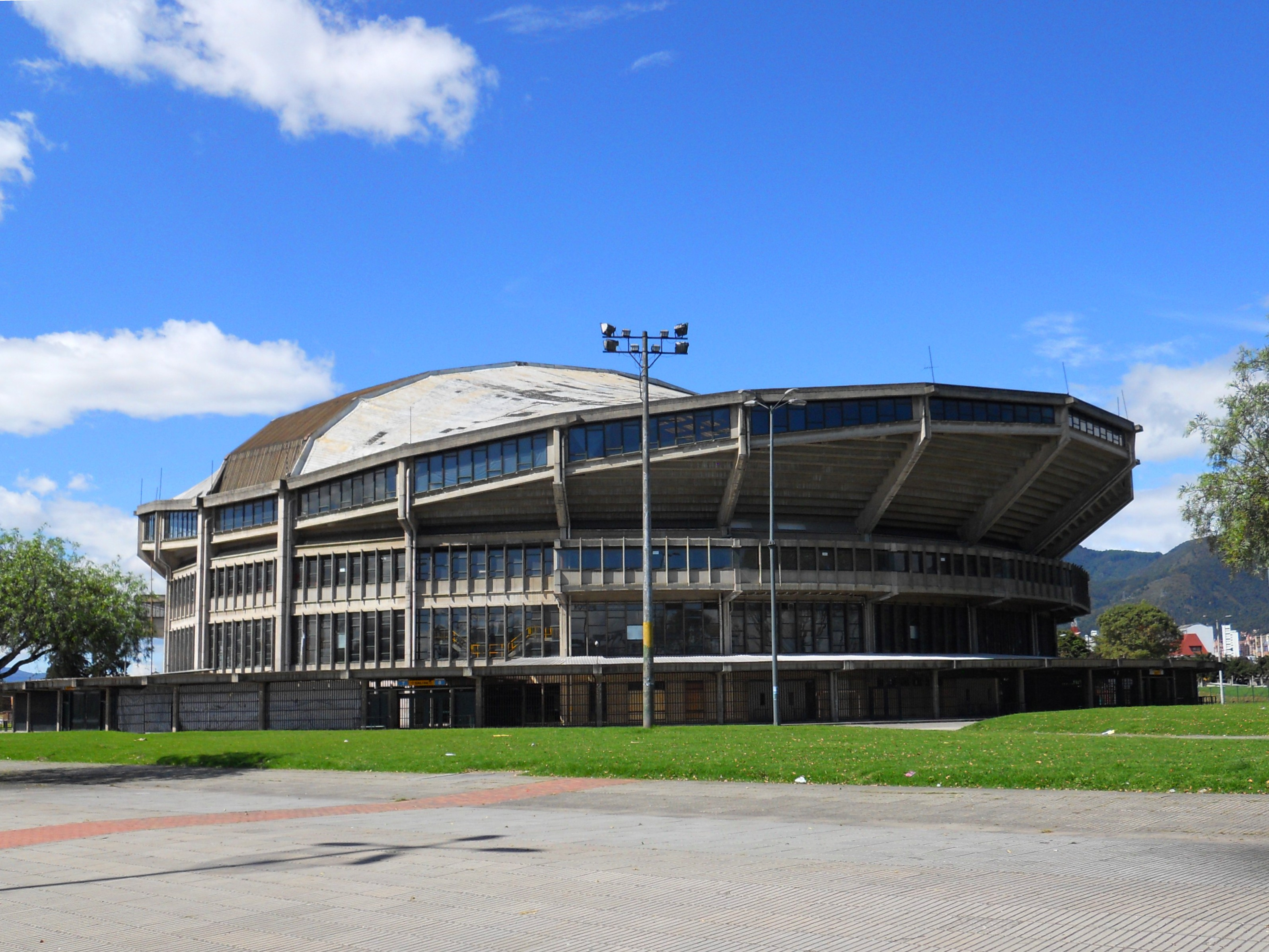 costado sur del coliseo cubierto El Campín.